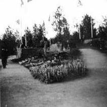 Bundesgartenschau 1957 in Köln - Bastion